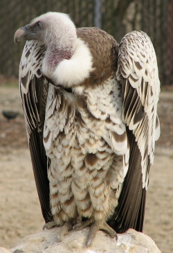 Rupell's Griffon Vulture